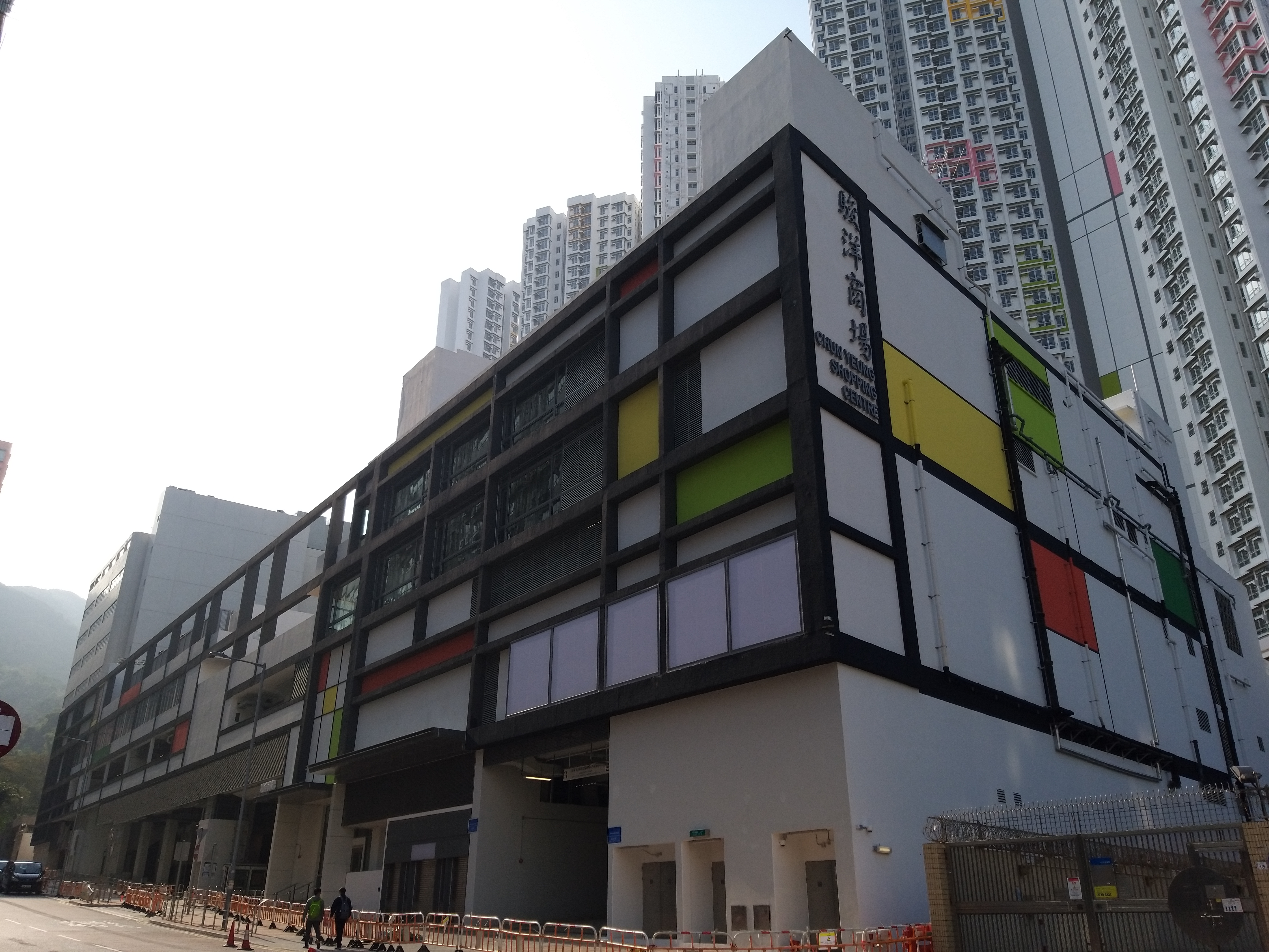 2020年2月進度